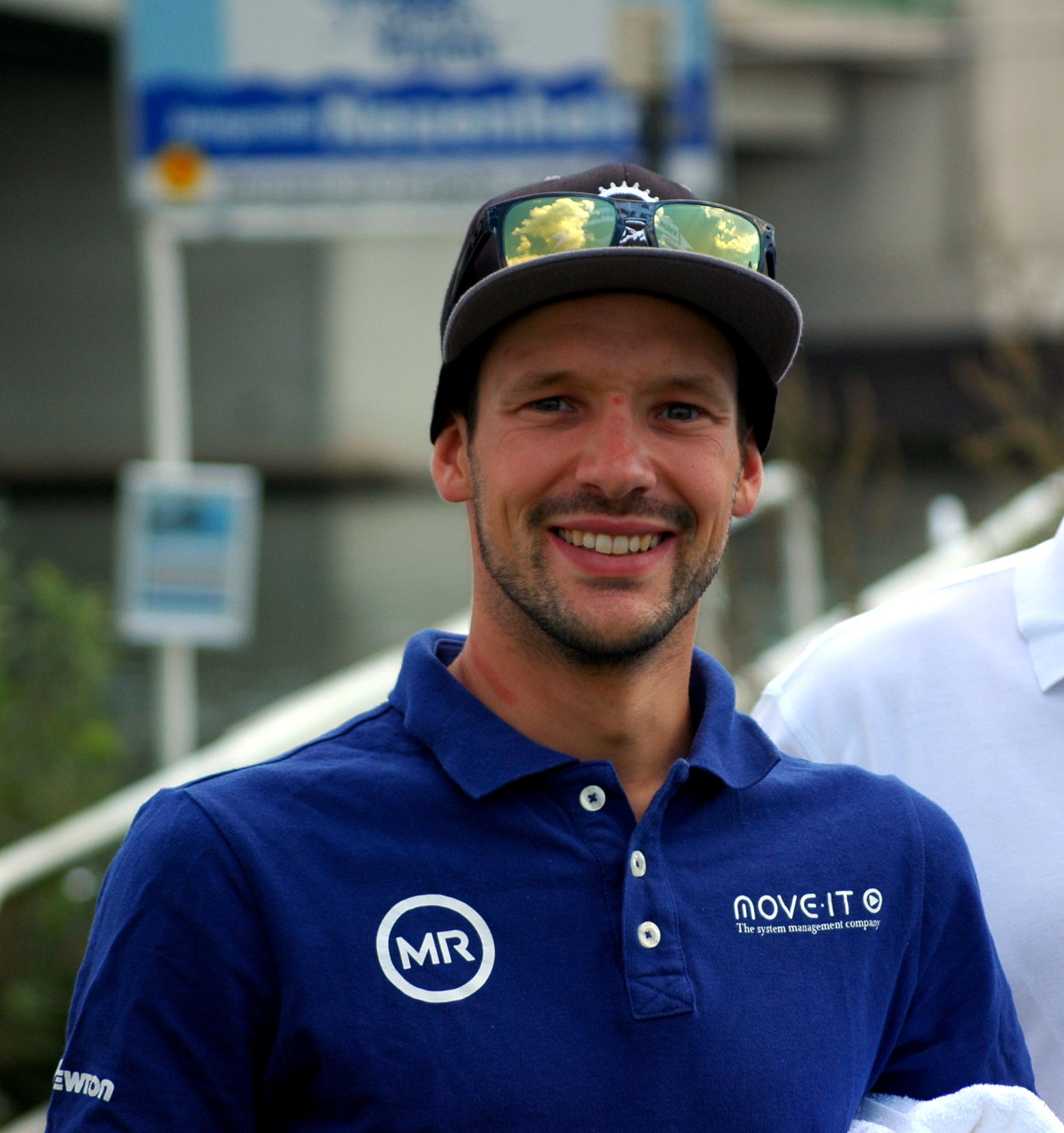 HeidelbergMan 2015: Patrick Lange